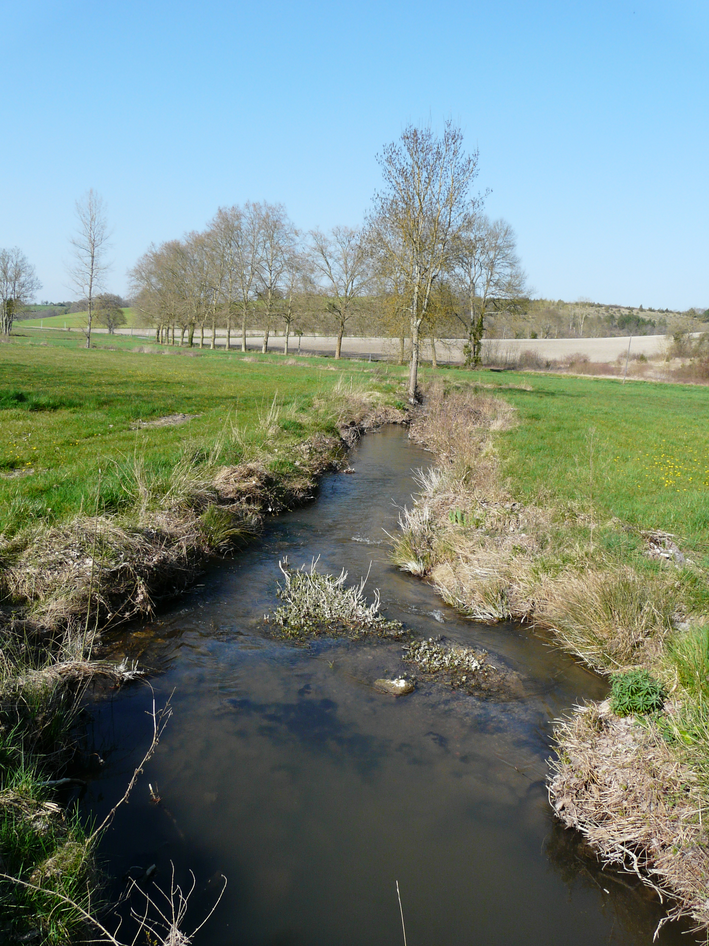 La Peychay au lieu-dit le Grand Champ, entre Saint-Martin-de-Ribérac (à gauche) et Saint-Pardoux-de-Drône (à droite). Vue prise en direction de l'aval.